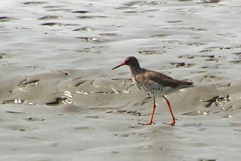 TRinga totanus in german nationalpark Schleswig-Holsteinisches Wattenmeer .